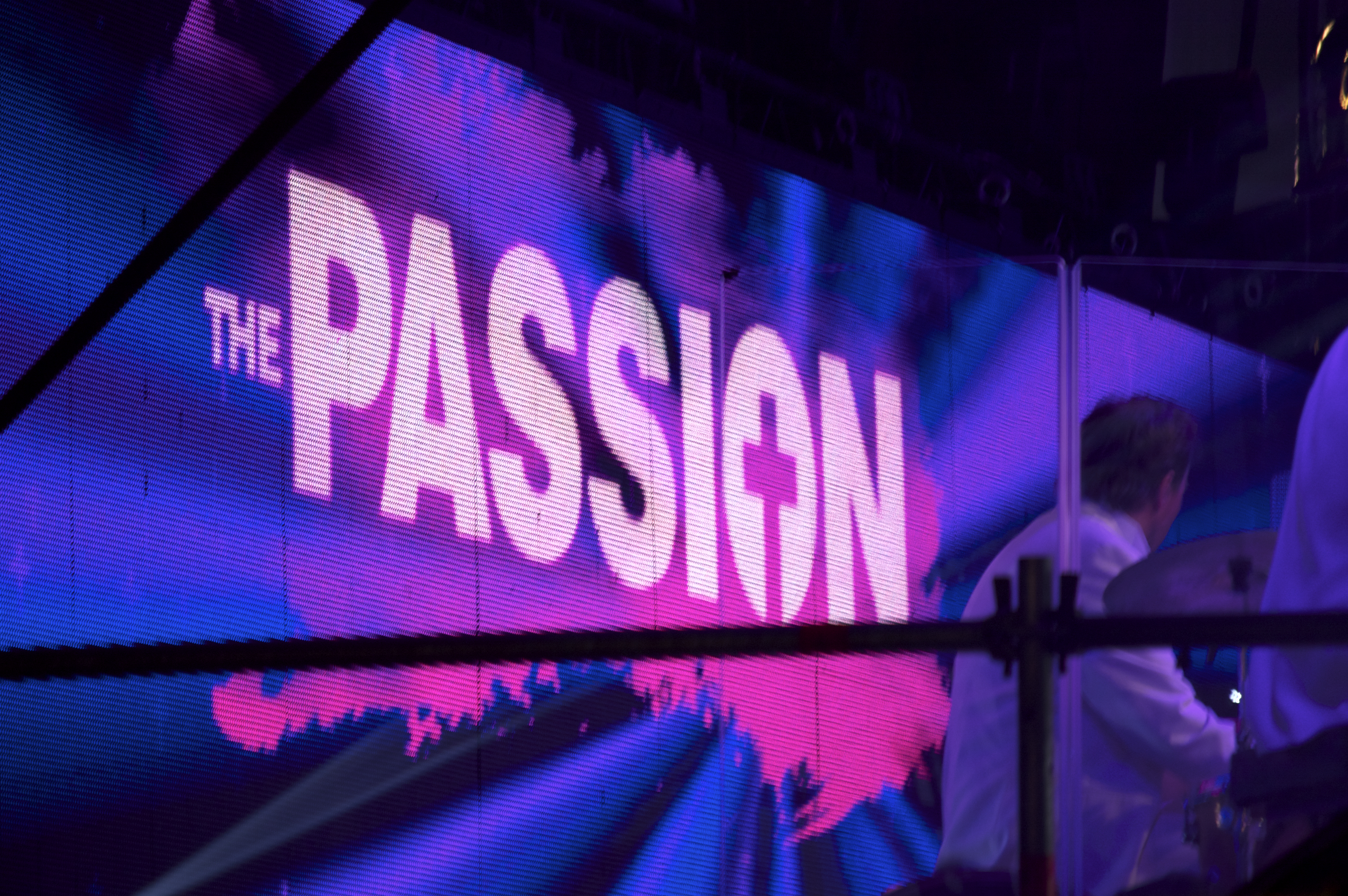 'The Passion', een evenement dat in 2012 in de havenstad Rotterdam werd gehouden.